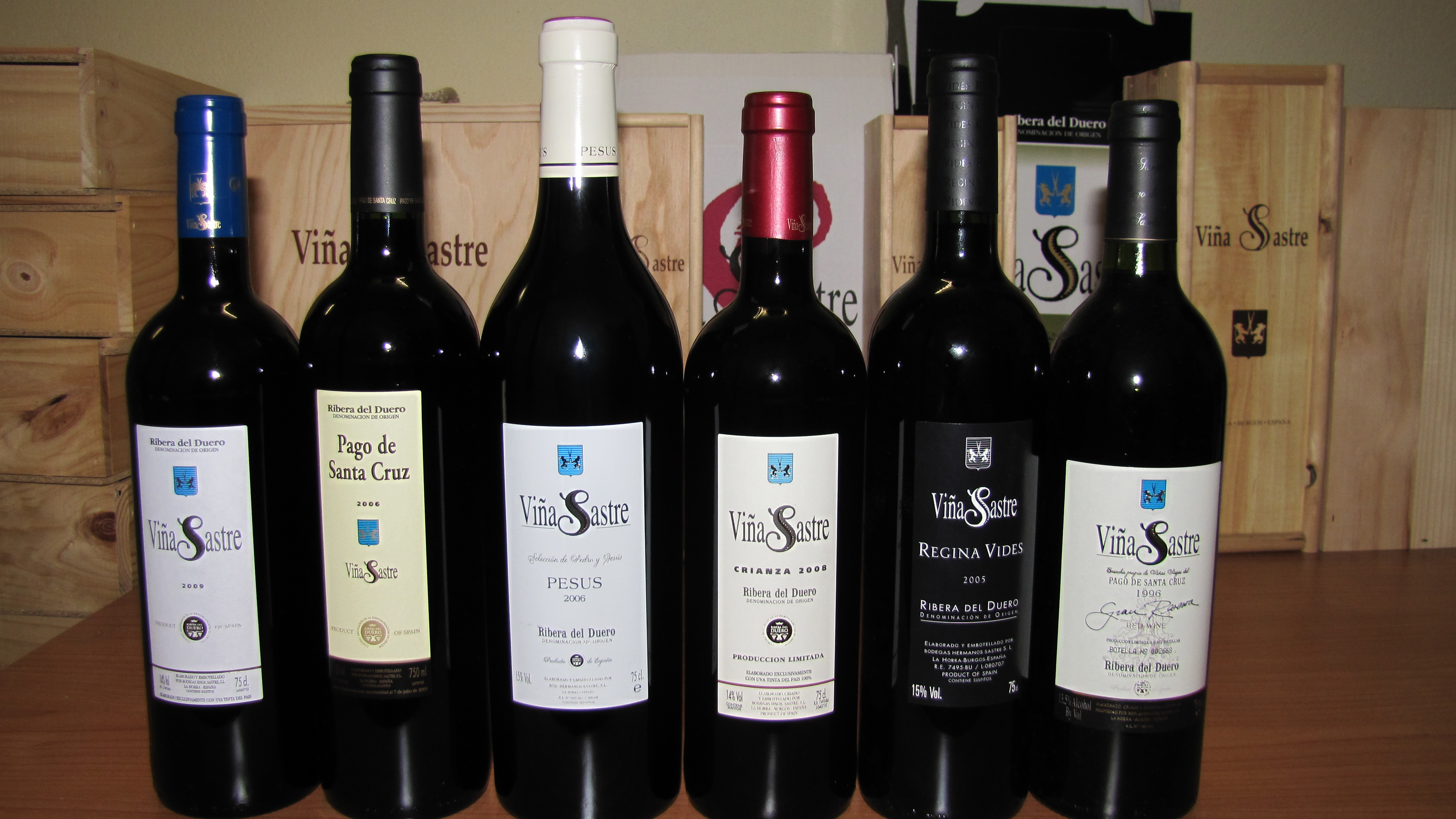 Fotografía con 6 botellas diferentes de la Bodega Viña Sastre - Hermanos Sastre, de la Ribera del Duero burgalesa (España). En la foto a la izquierda se sitúa un vino joven de 2009. La segunda botella por la izquierda, un Pago de Santa Cruz, de 2006. La tercera es un Pesus de 2006. La cuarta un crianza de 2008. La Quinta es un Regina Vides de 2005. Y última, situada a la derecha, un Pago de Santa Cruz de 1996.